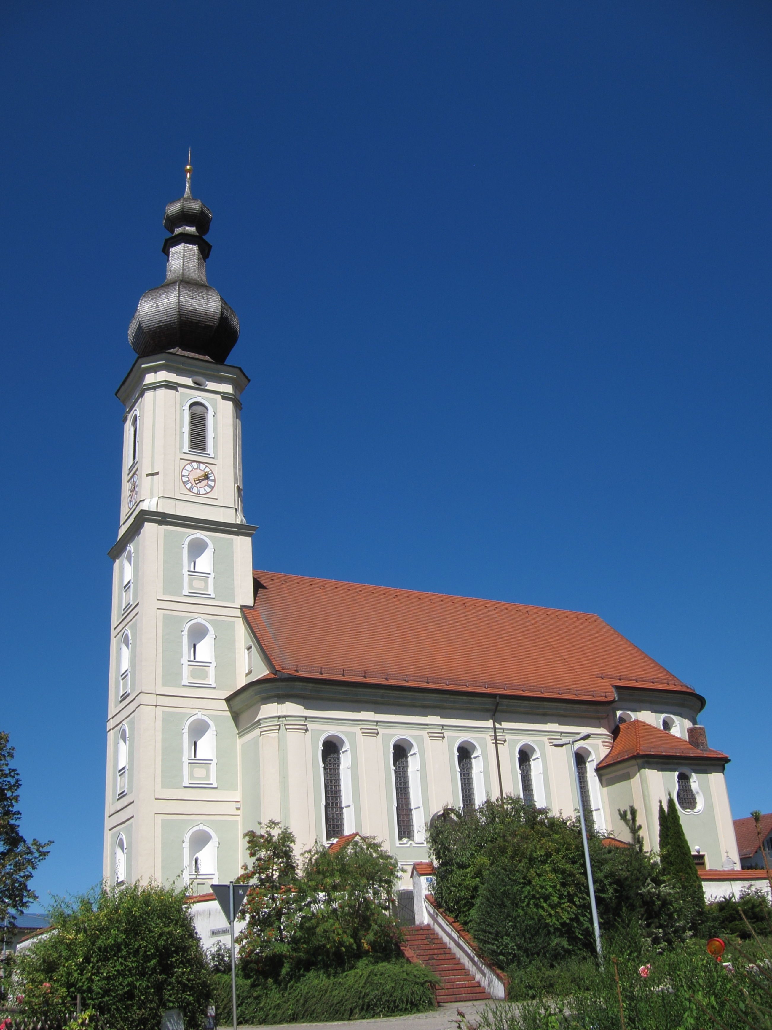 St. Martin; katholische Pfarrkirche, Saalbau mit eingezogenem halbrundem Chorabschluss und Zwiebelturm auf gotischem Vorgängerbau, von Johann Baptist Lethner, 1757-60; mit Ausstattung; Friedhofsmauer mit Mauerbögen, gleichzeitig.